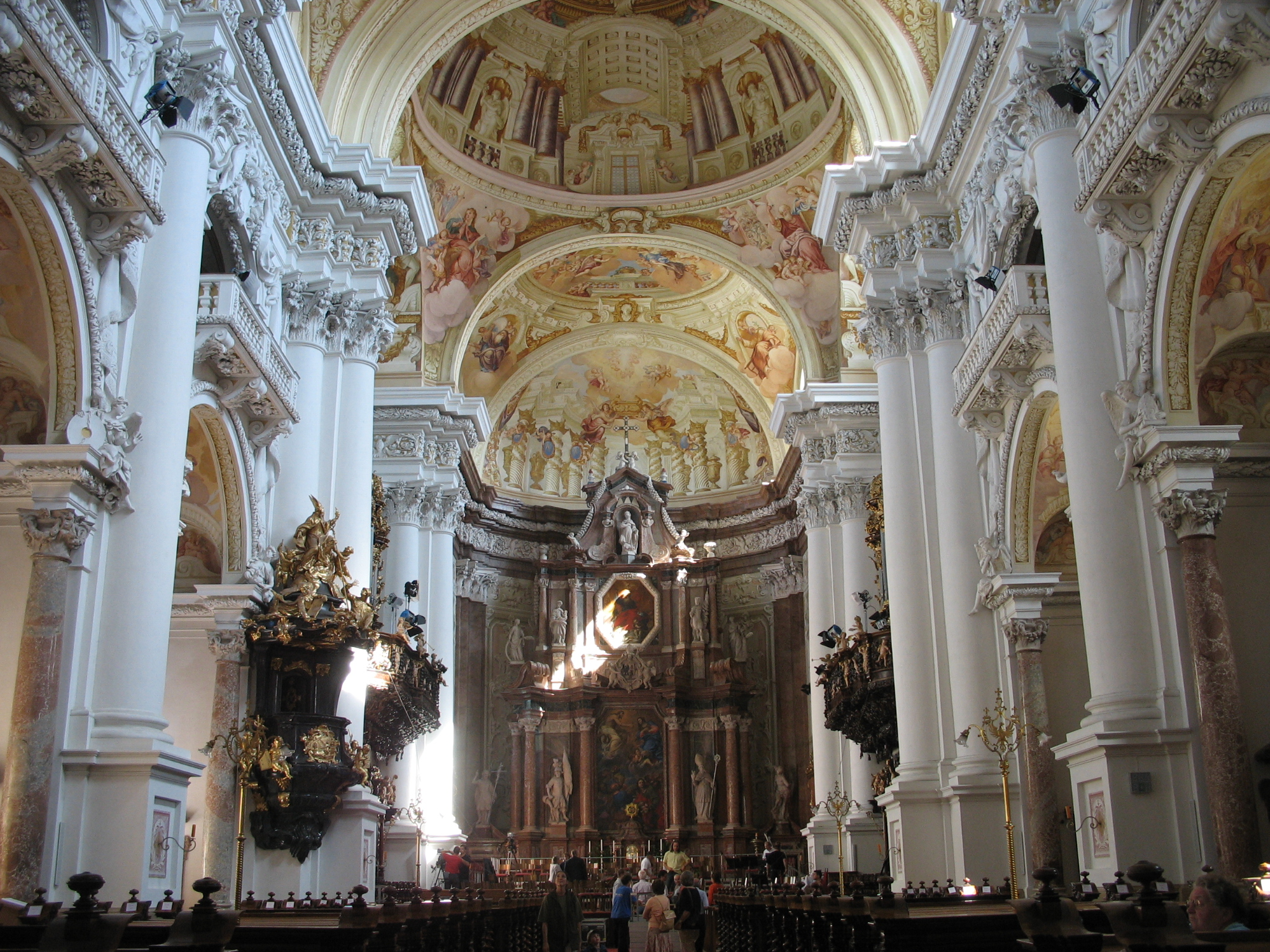 Stift St. Florian, Oberösterreich: Basilika